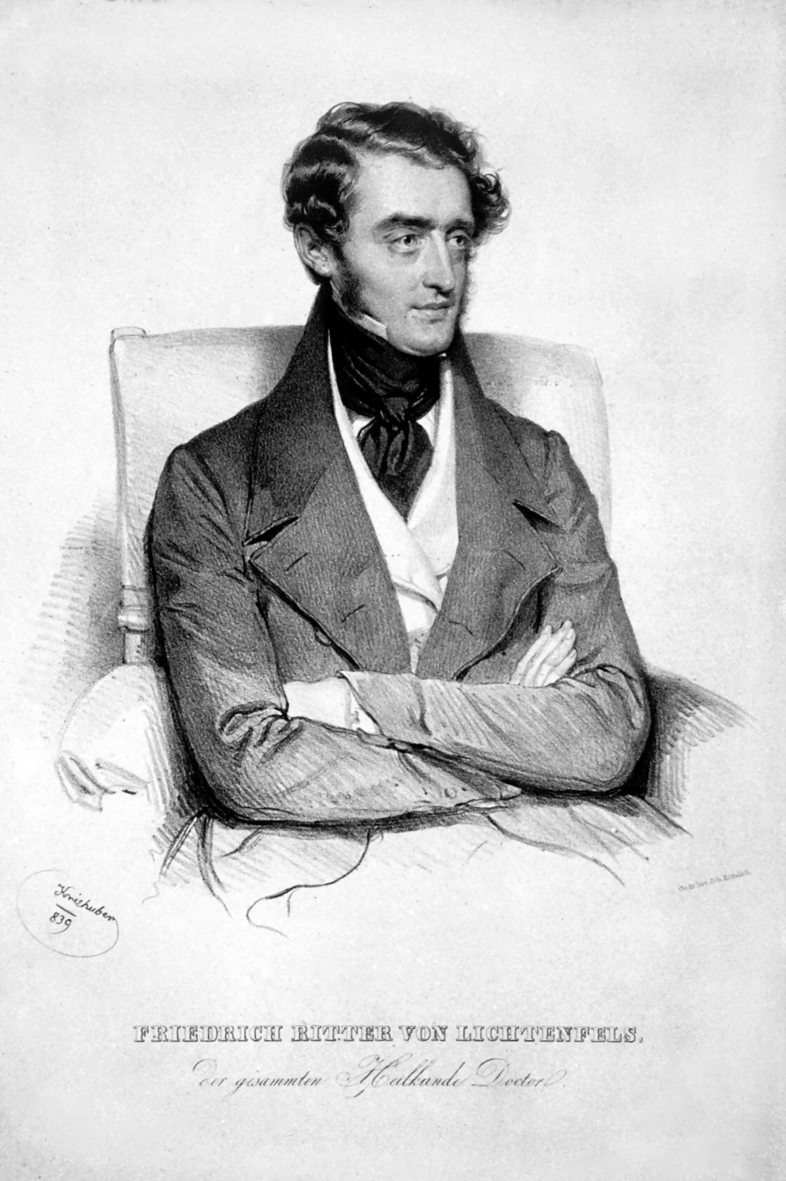 Friedrich Peithner von Lichtenfels (1795-1853), Dr. med. Professor für Geburtshilfe in Wien. Lithographie von Josef Kriehuber, 1839